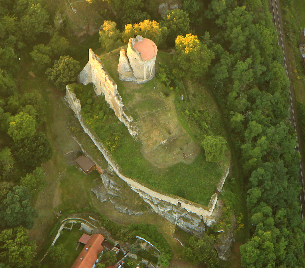 Hrad Michalovice, zřícenina a archeologické stopy, Michalovice, severní okraj vsi, Dalovice